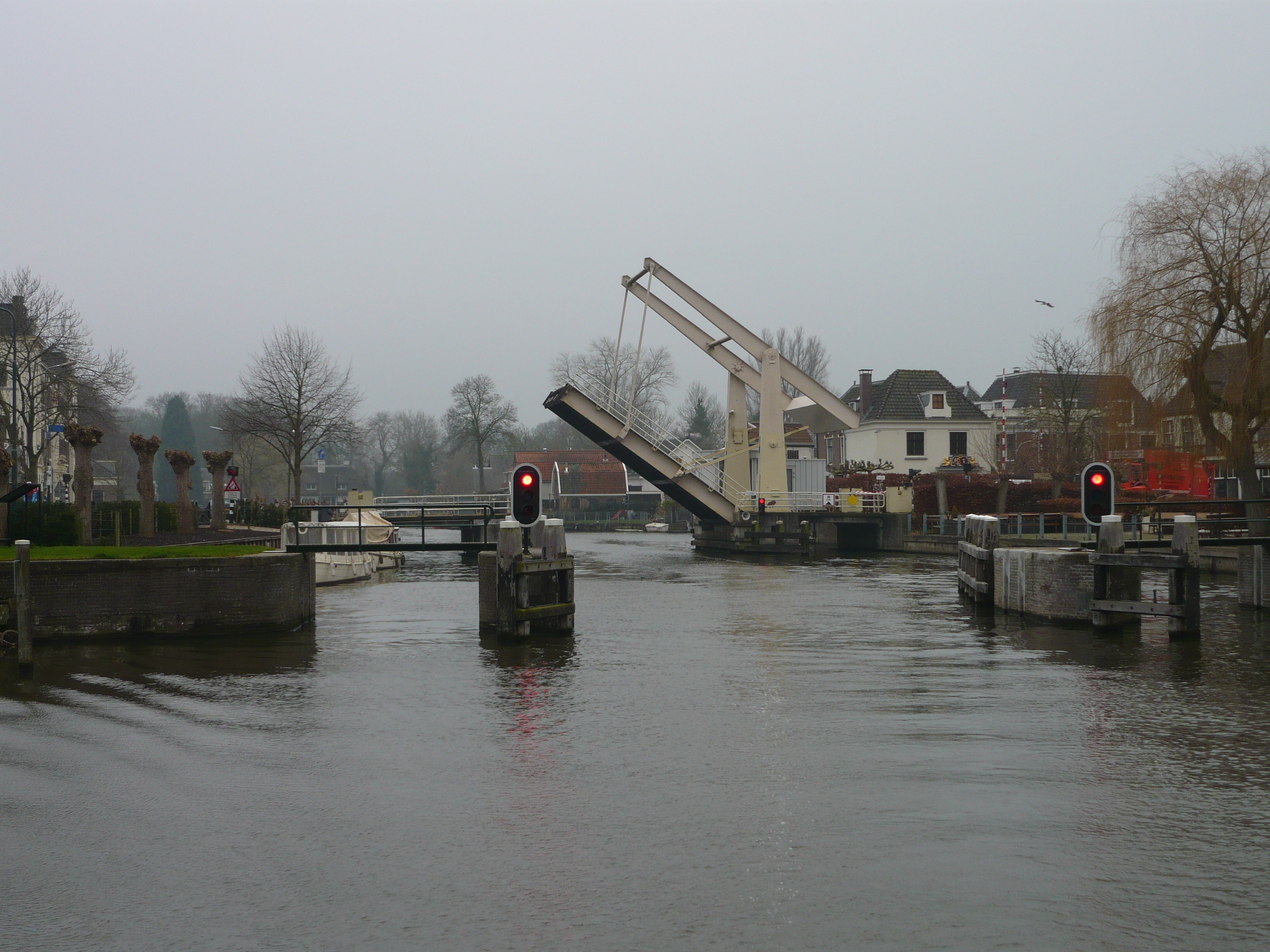 De Nieuwersluisbrug over de Vecht in Nieuwersluis